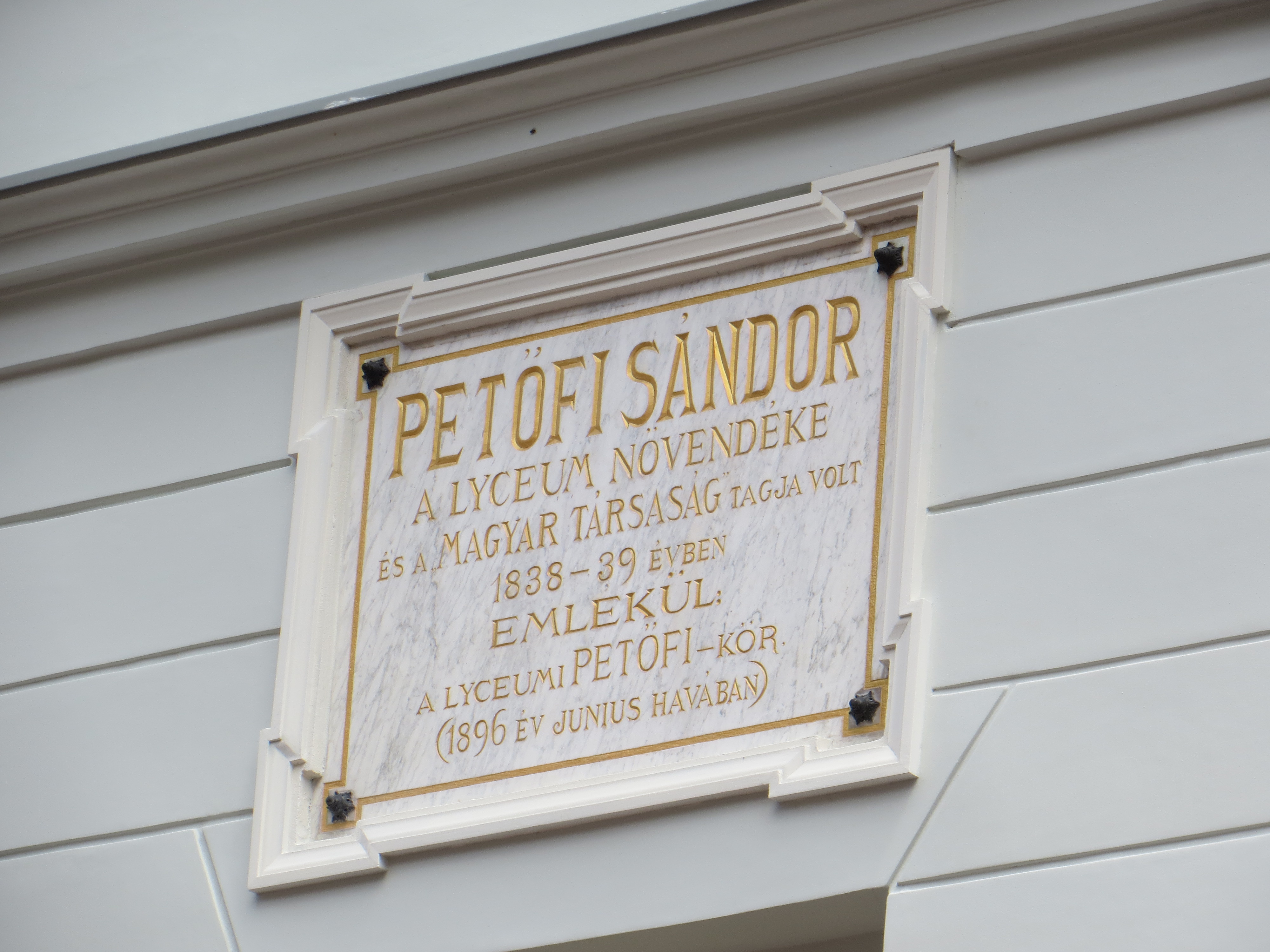 Emléktábla a líceum falán.